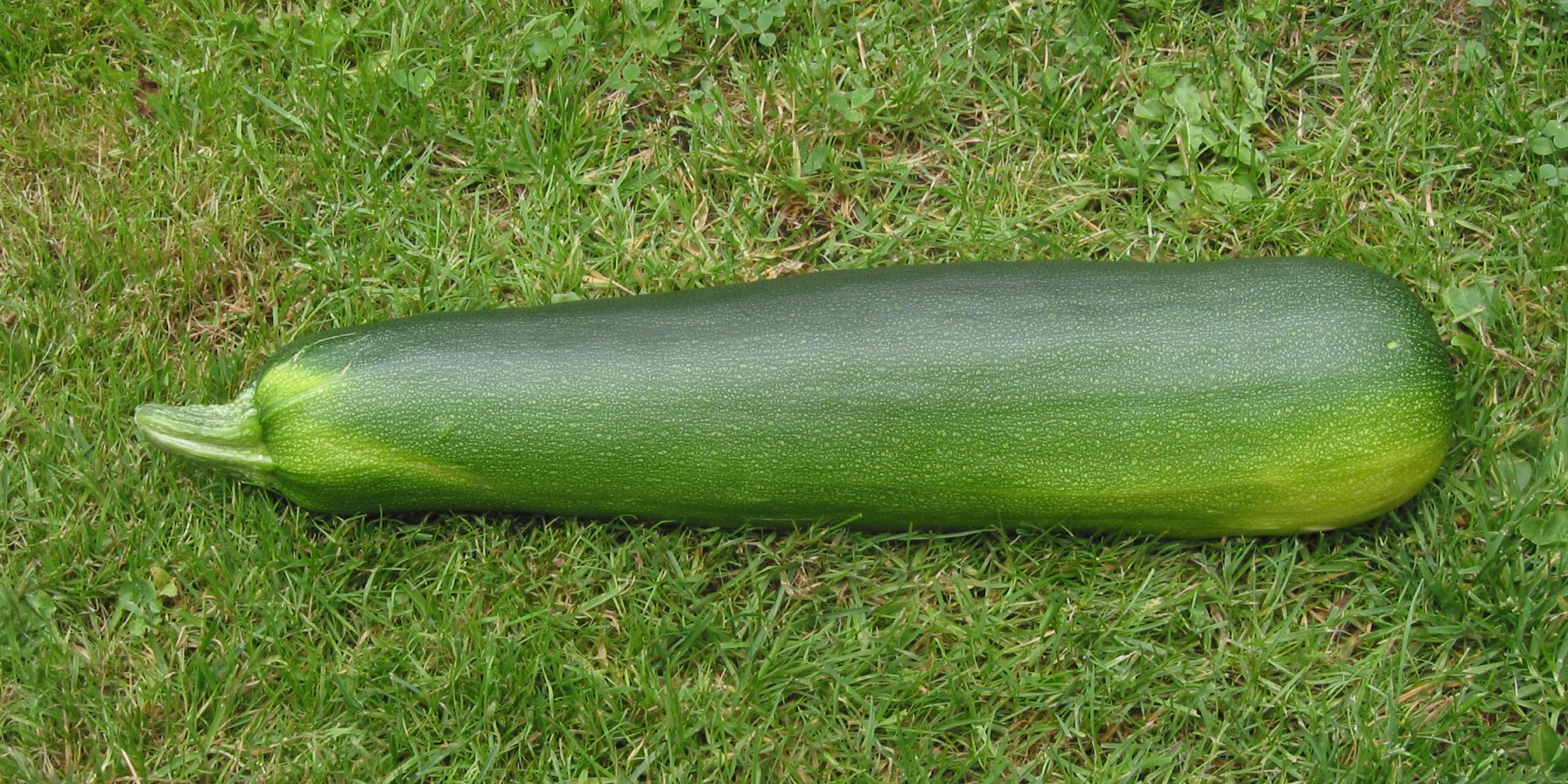 (nl: courgette) Cucurbita pepo